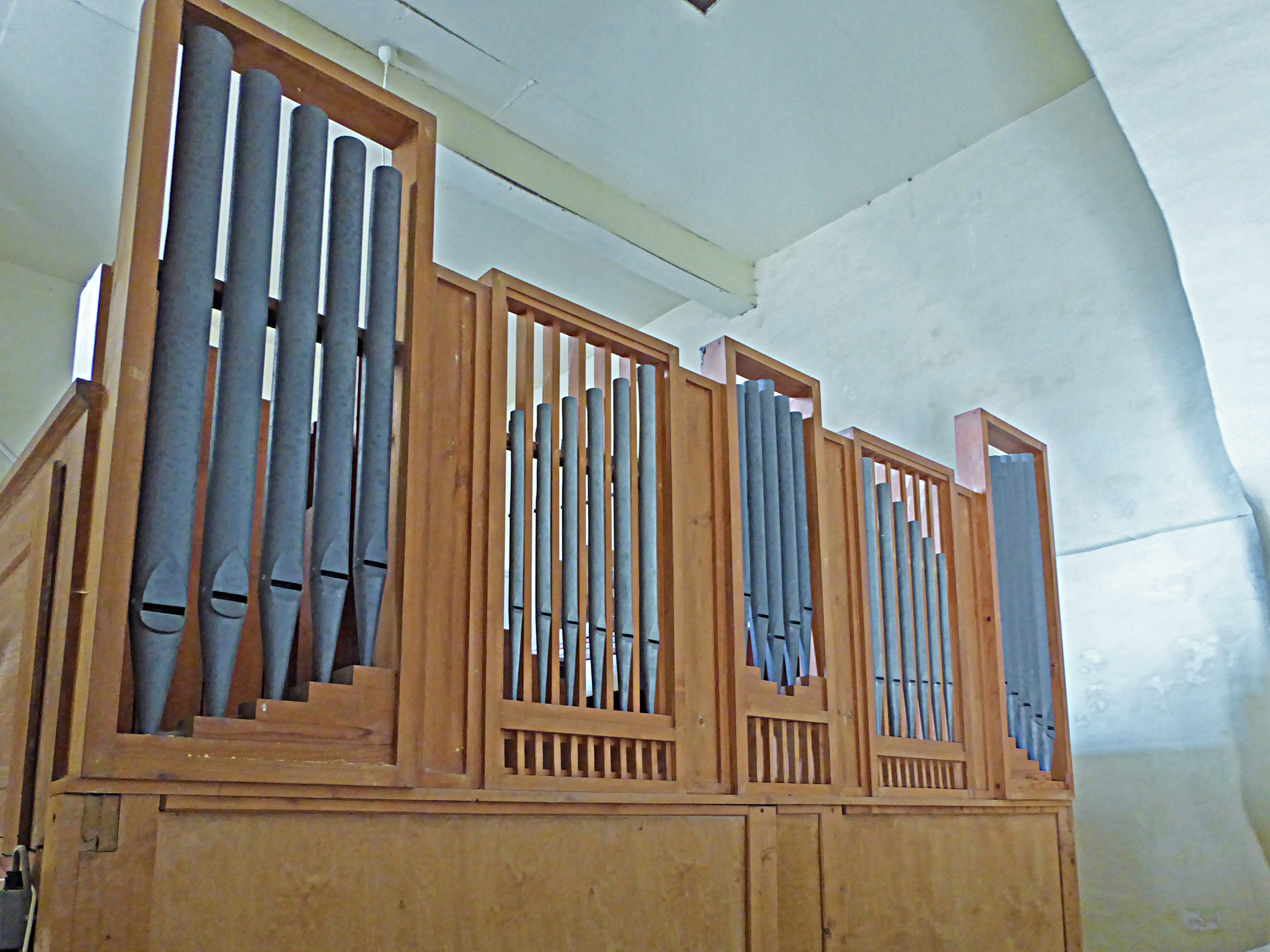 Orgel von Orgelbau A. Schuster & Sohn (1973, I/P 7) in der Dorfkirche St. Petrus und Paulus (Großberndten)